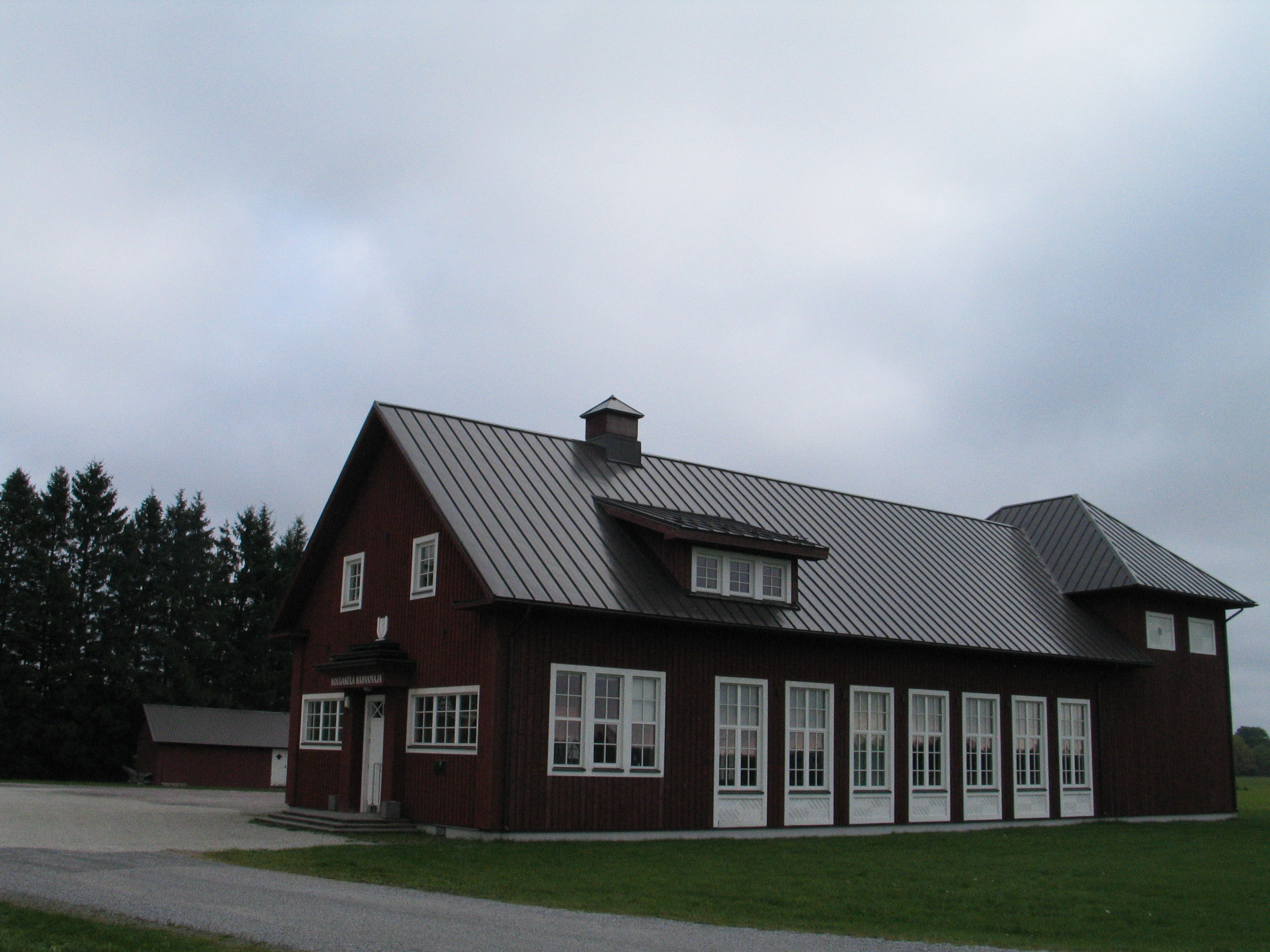 Kolgaküla rahvamaja